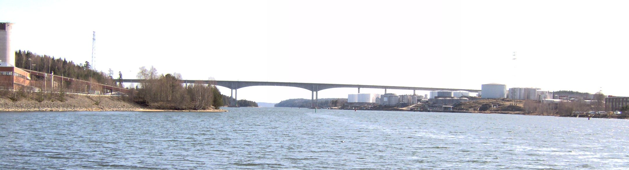 Igelstabron över Södertälje kanal. Seglingsfria höjden är 42 meter. Till vänster syns Igelstaverket och till höger, Oljehamnen i Södertälje.2006. Igelstabridge crossing Södertäle canal. Sailfree hight is 42 meters. To the left is Igelsta heating burners and to the right, Oilharbour of Södertälje. 2006.